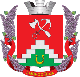 Герб Амвросіївки